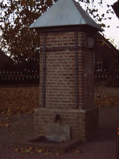 Foto Dorpspomp Est genomen door S.Ruitenbeek op 9-11-2006